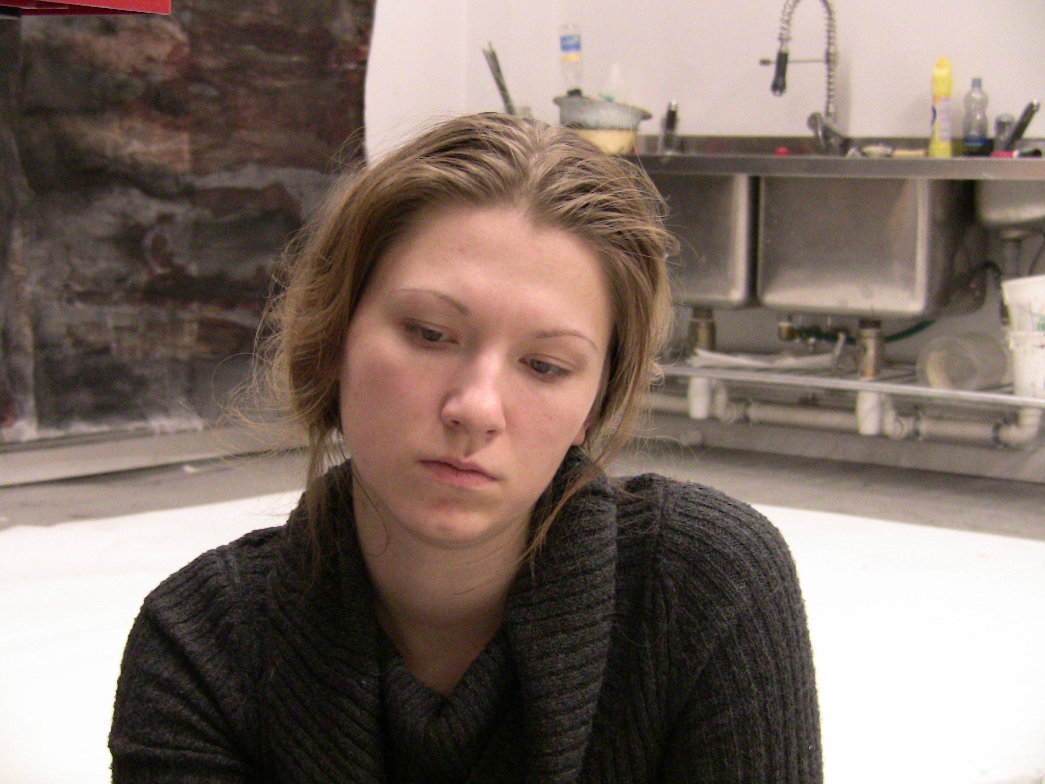 Nadežda Tšernobai ateljees.Foto: Robert Treufeldt, 16. detsember 2009